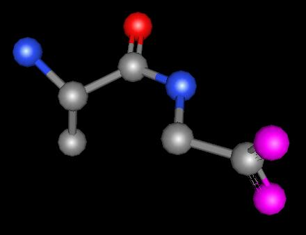 Dipeptid Ala-Gly - Ball and stick molecular graphic created by program Ghemical